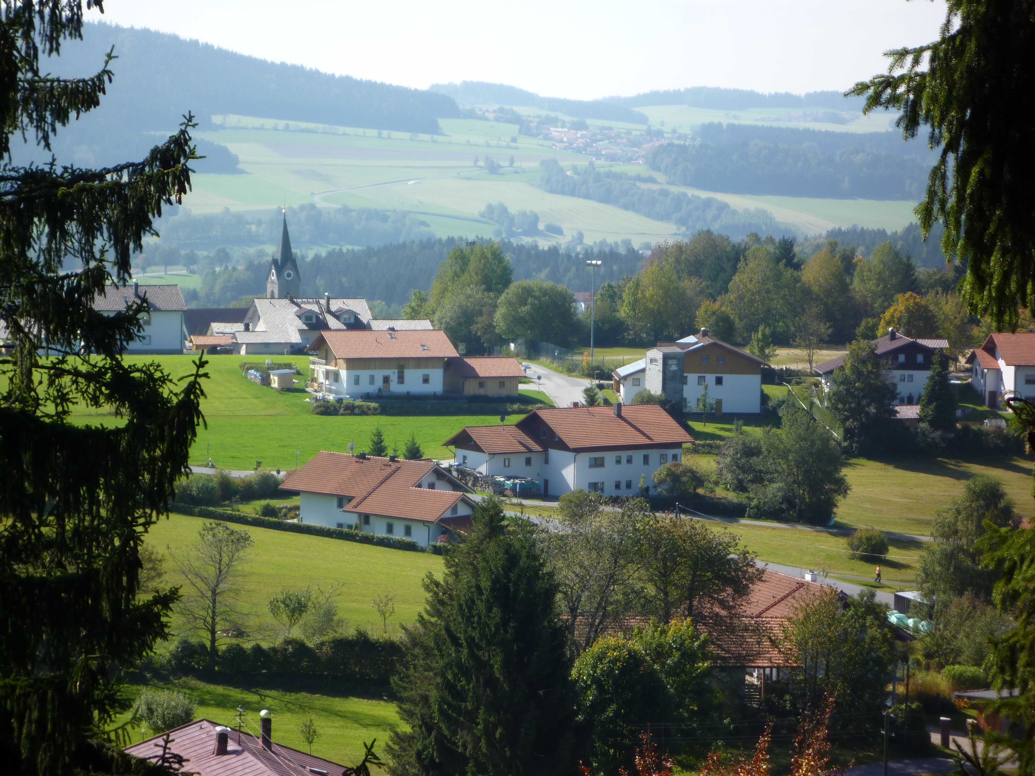 Neuschönau - Ort vom Baumturm